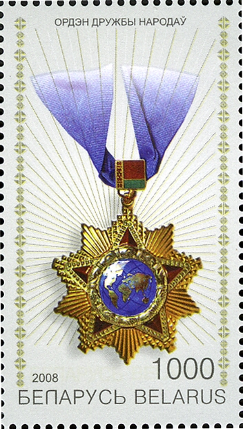 № 744. Орден Дружбы народов